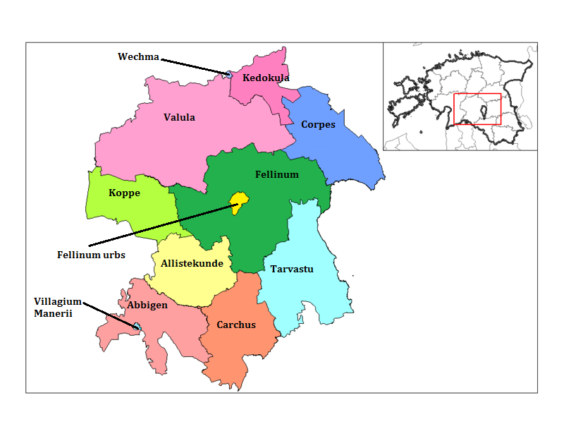 Fellini municipia Latine